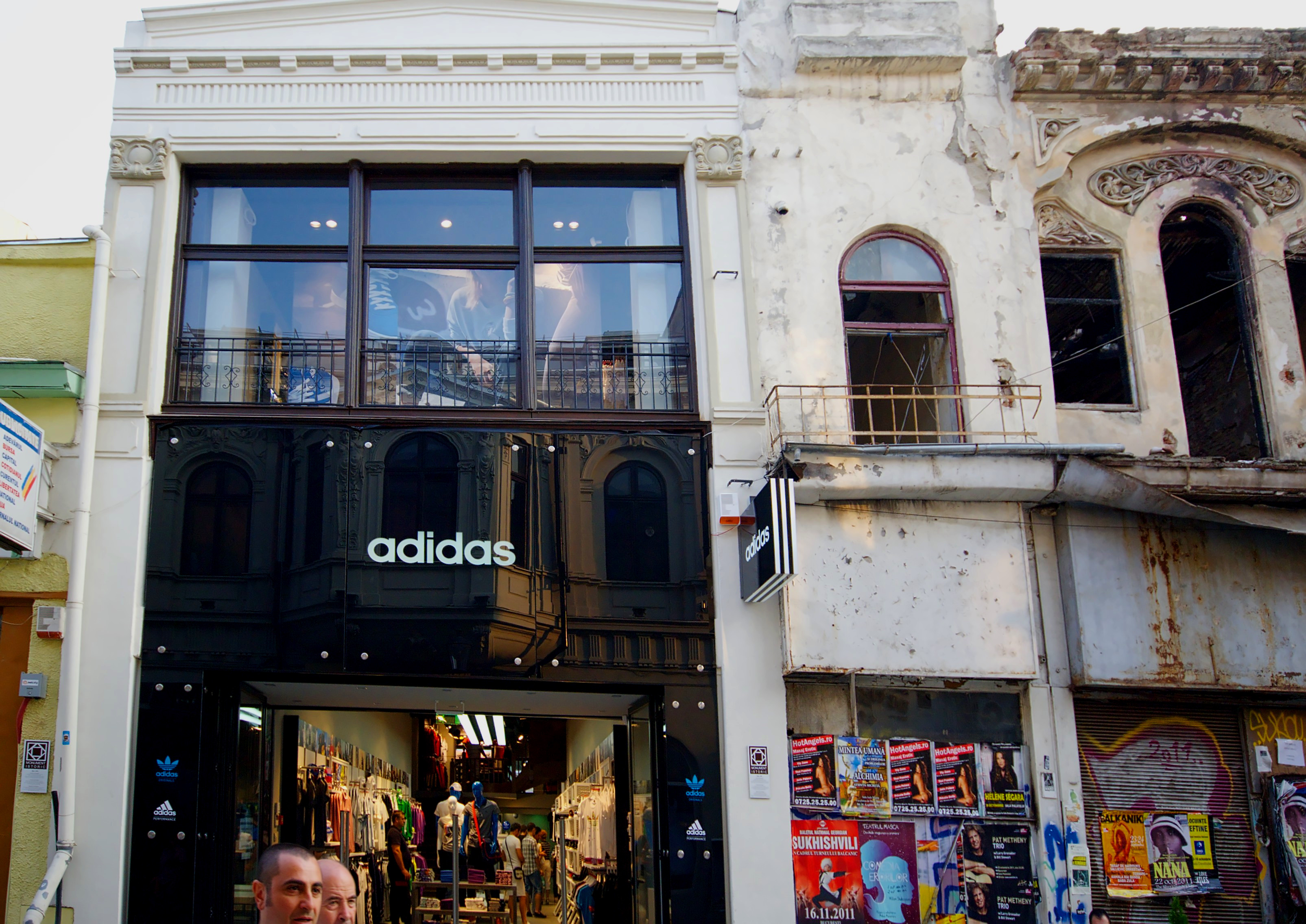 Casă cu prăvălie, Lipscani 76